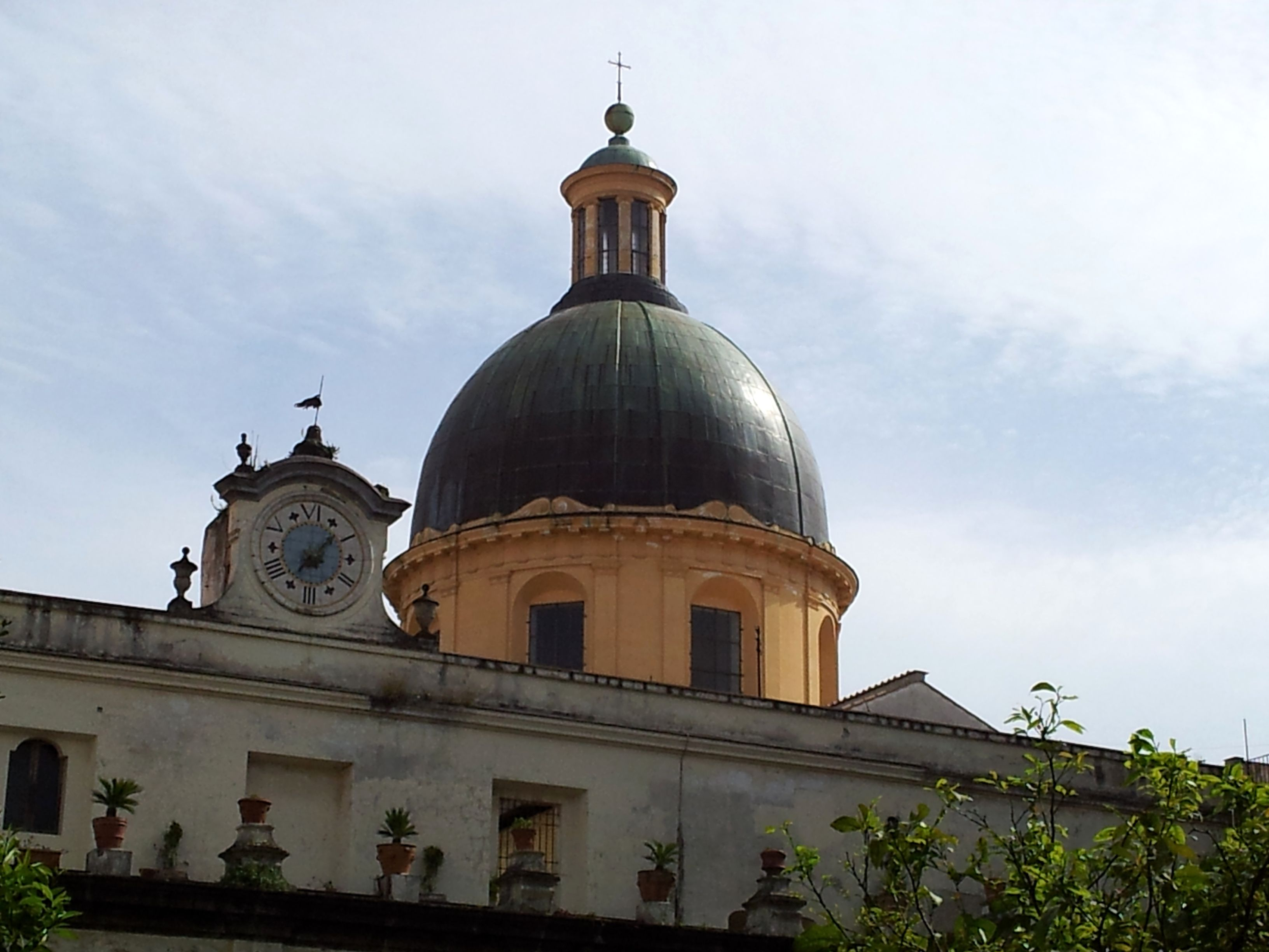 Chiostro degli Aranci (Chiostro grande dei Girolamini, Napoli)